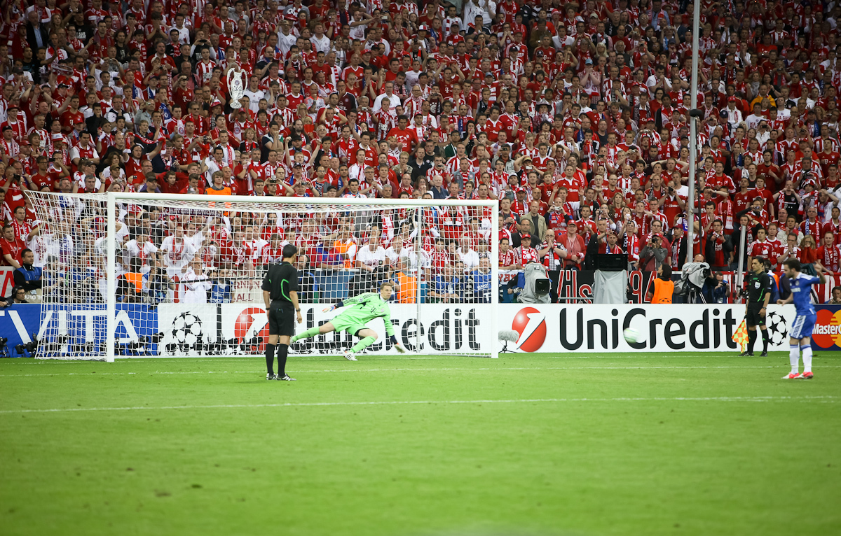 RA1_6365